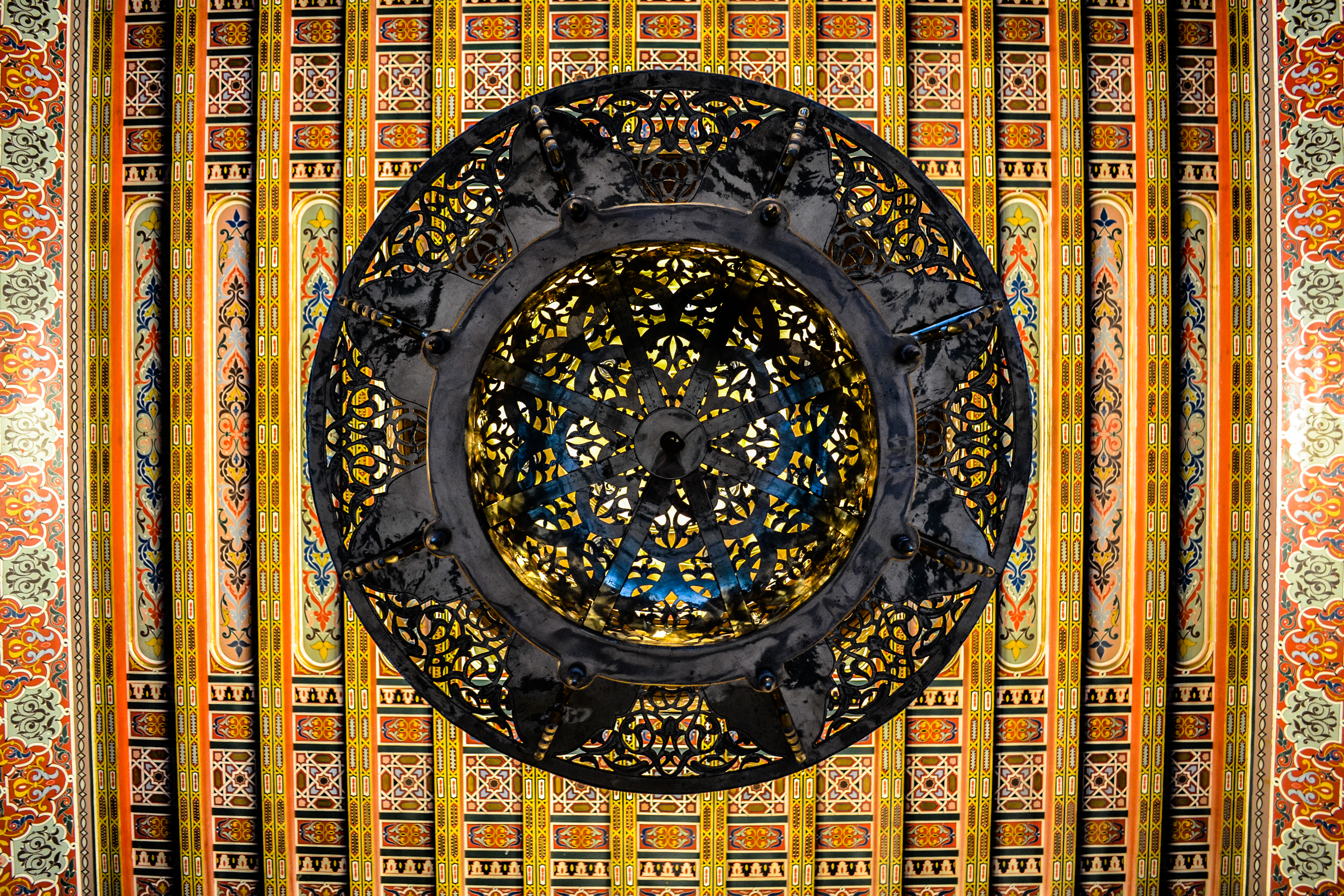 Roof of the Mohammed VI Mosque, Oujda, Morocco